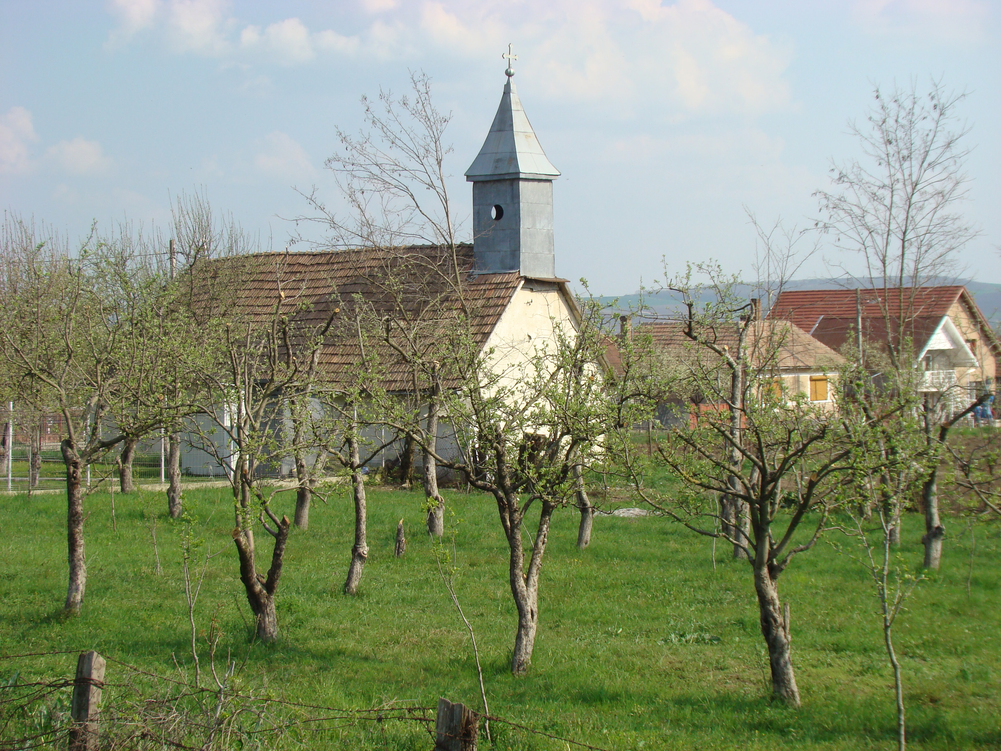 Biserica de lemn, sat aparţinător SFÂNTU GHEORGHE; oraş IERNUT